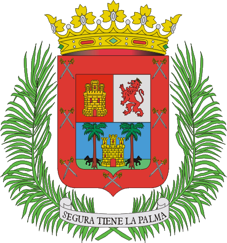 Escudo de Las Palmas de Gran Canaria